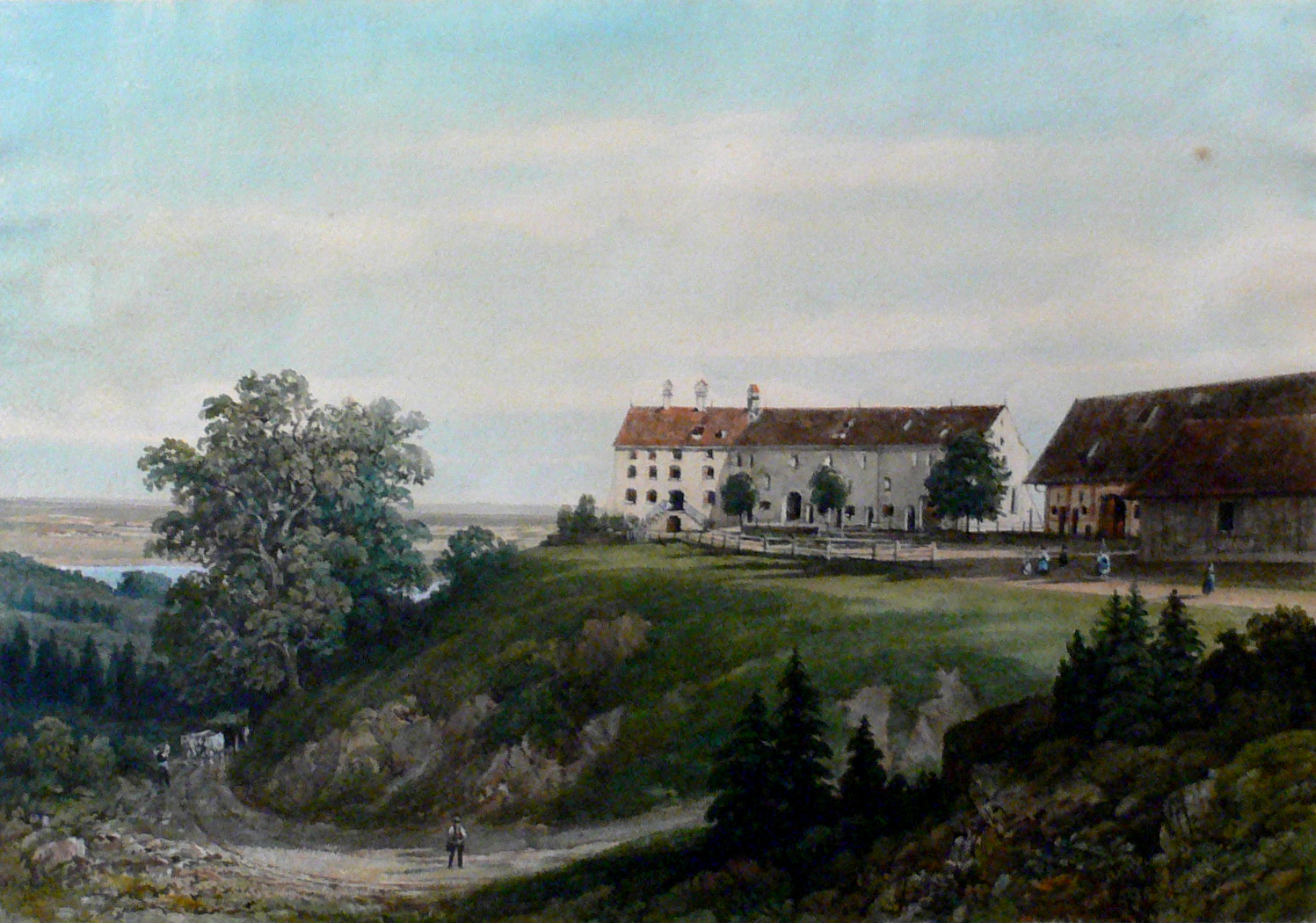 Burg Königsegg, Aquarell, 34 x 48 cm, Privatbesitz